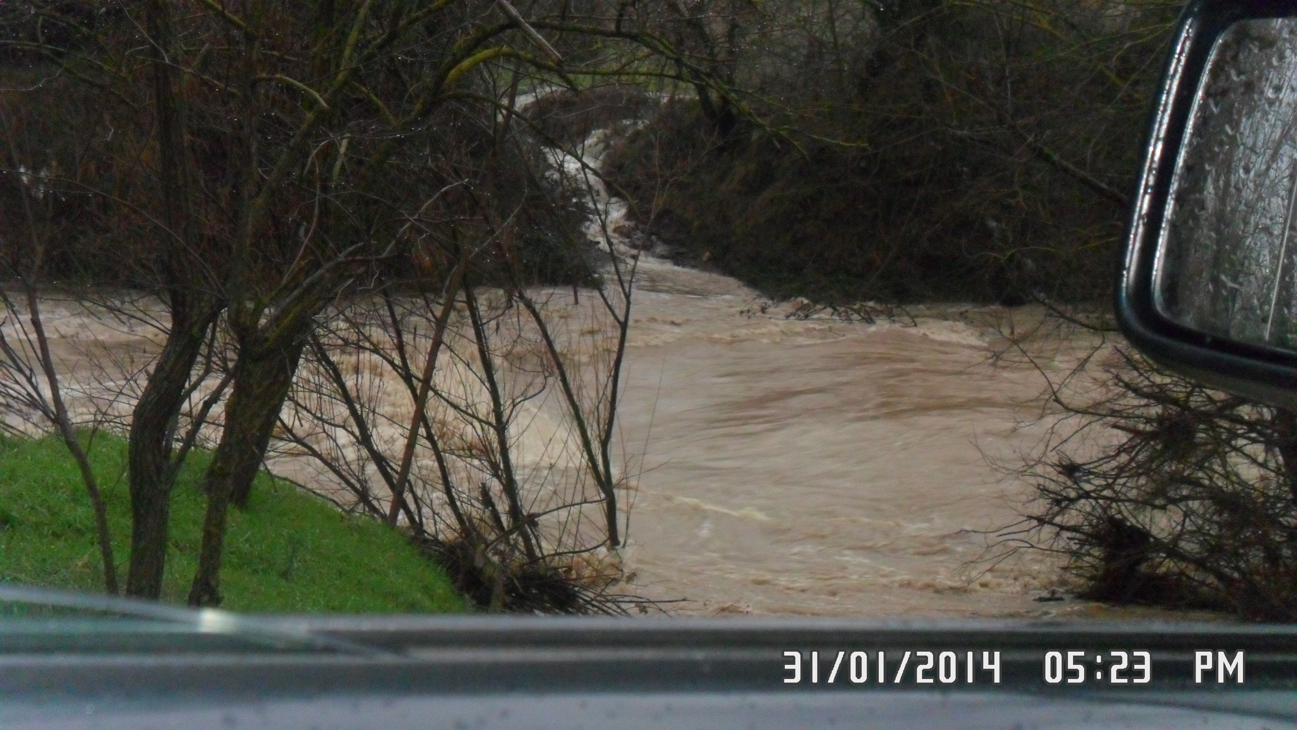 Salto